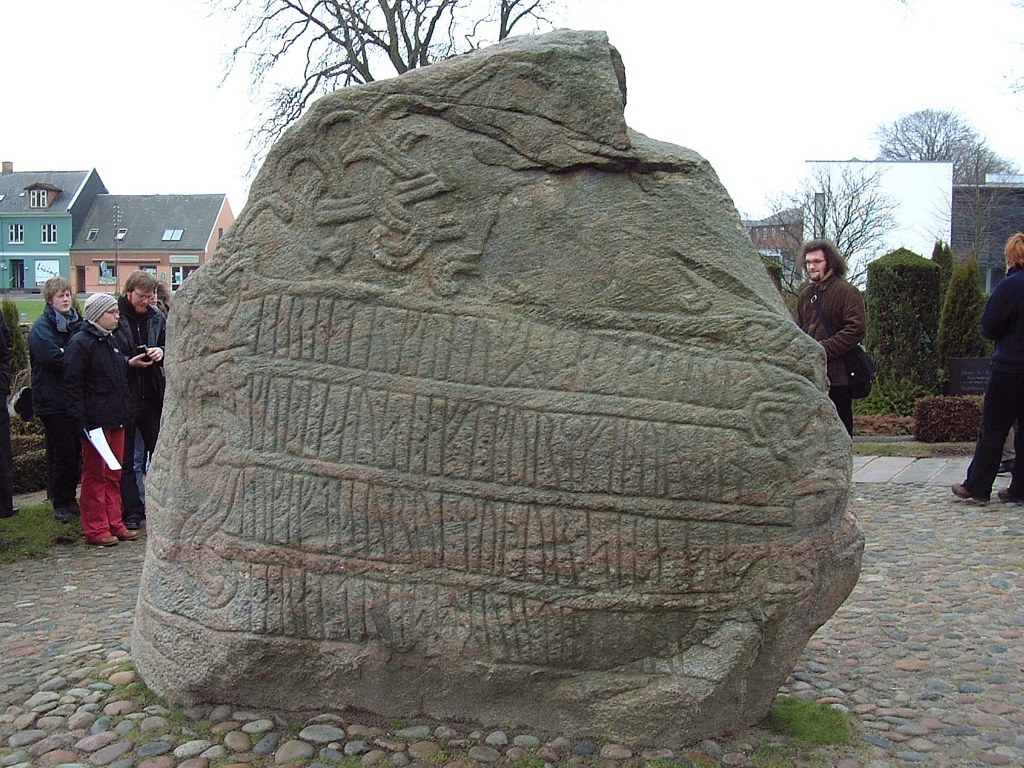 Großer und jüngerer Runenstein von Jelling mit der Aufschrift: "König Harald befahl diesen Stein zu errichten, zum Gedenken an Gorm, seinen Vater, und an Thyra, seine Mutter. Der Harald, der sich ganz Dänemark und Norwegen unterwarf und die Dänen zu Christen machte."